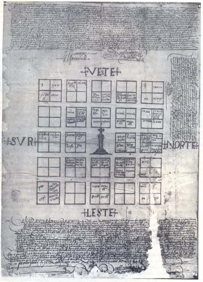 Plano fundacional de la Ciudad de la Resurrección (Mendoza) por el Capitán Juan Jufré - 28/3/1562-. (AGI, Mapas y Planos, Buenos Aires 10. R Torres Lanzas, 1921. 43x59 cm. Reducción del 30% de la copia fotográfica proporcionada por el Archivo General de Indias de Sevilla -19.5x27.3 cm.-).